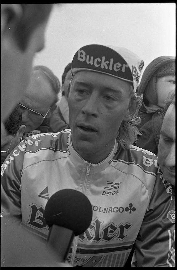 Na zijn overwinning in 1991. Een jaar eerder maakte de Limburger de overstap van Panasonic naar Buckler en blijft daarmee in Nederlandse loondienst.